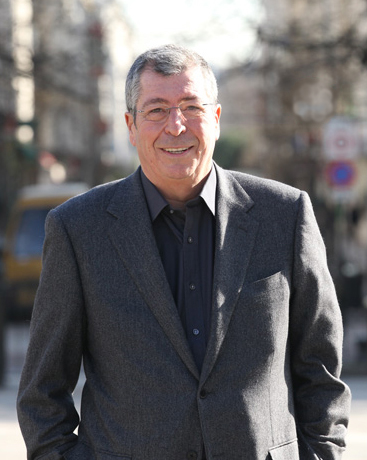 Patrick Balkany, Maire de Levallois, Député de la 5ème circonscription des Hauts-de-Seine Clichy Levallois